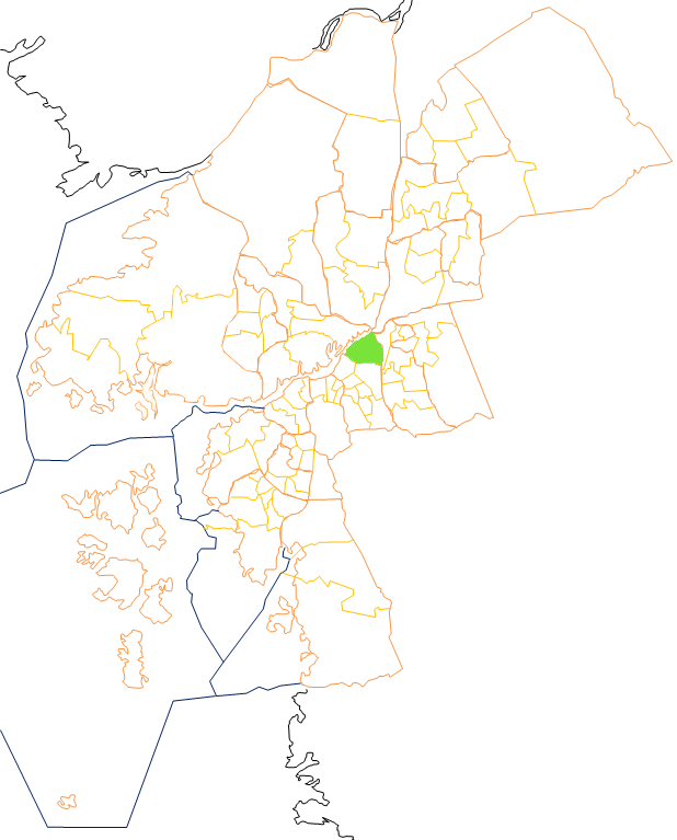 Karta som visar primärområdes belägenhet i Göteborg